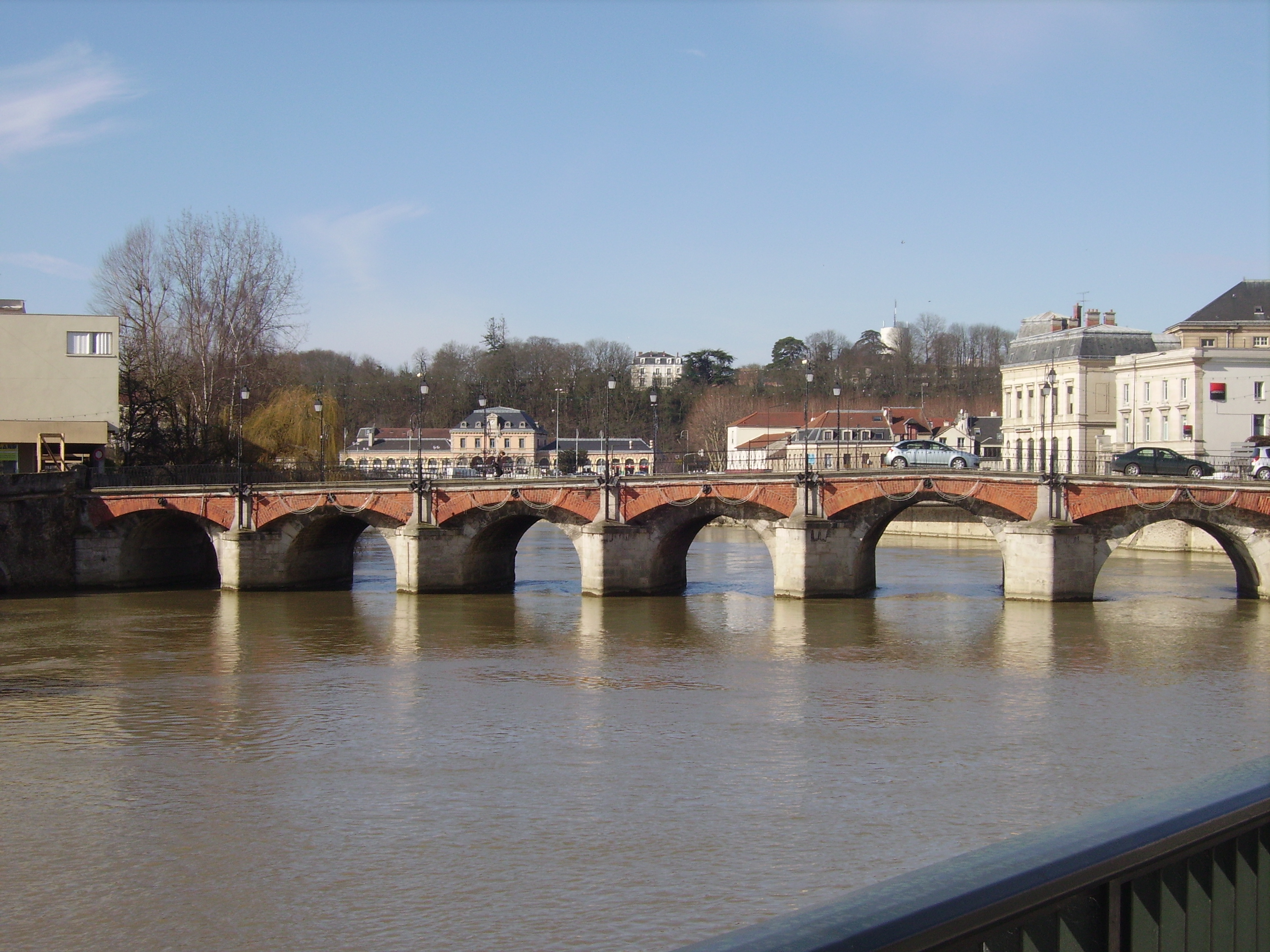 Meaux (Seine-et-Marne) : Le vieux pont du Marché